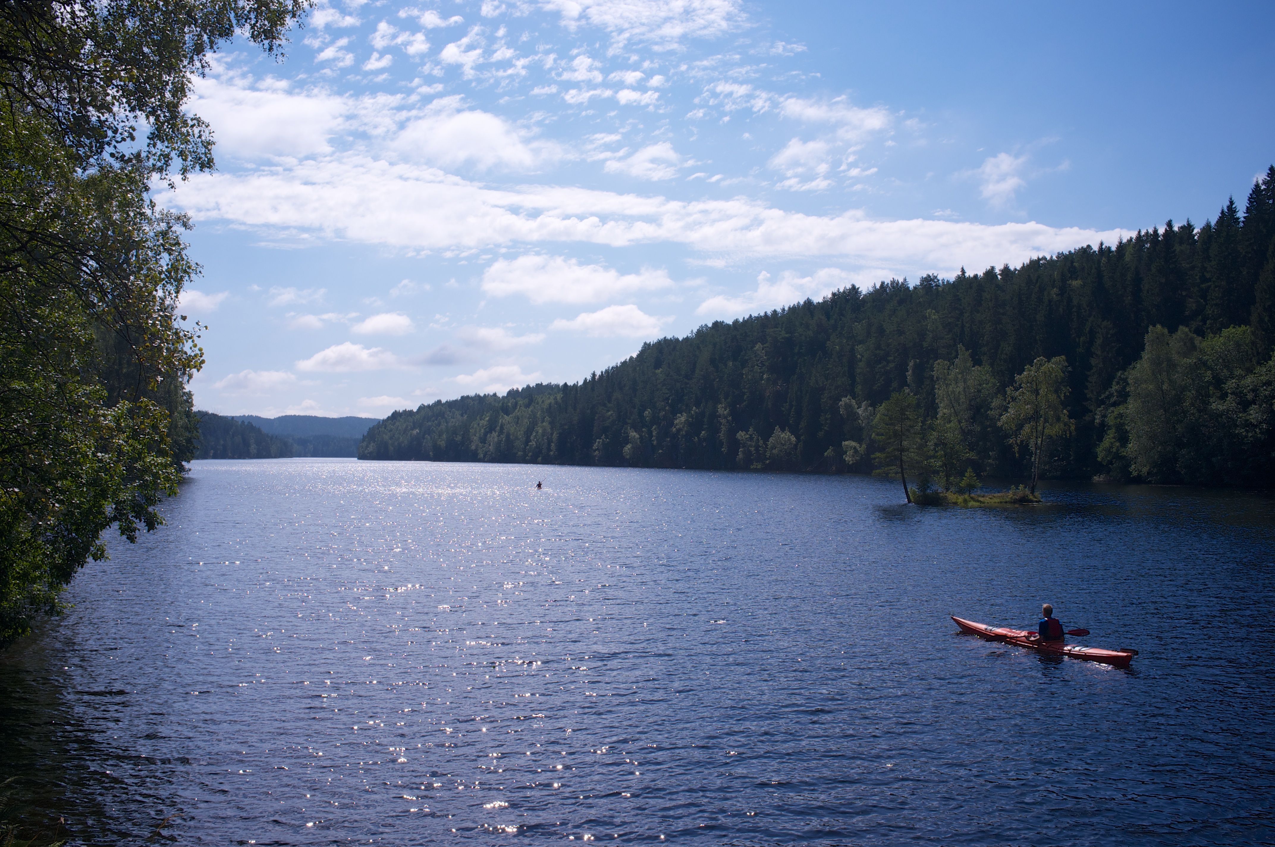 Nøklevann, mellom Korketrekkeren og Sarabråten. Østmarka i Oslo.